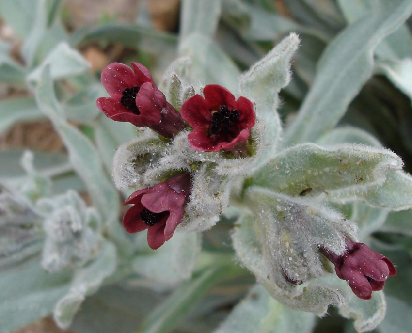 Pardoglossum cheirifolium subsp. cheirifolium (cynoglosse à feuilles de giroflée) Photo prise à Salses-le-Château